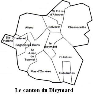 Le canton du Bleymard Image personnelle